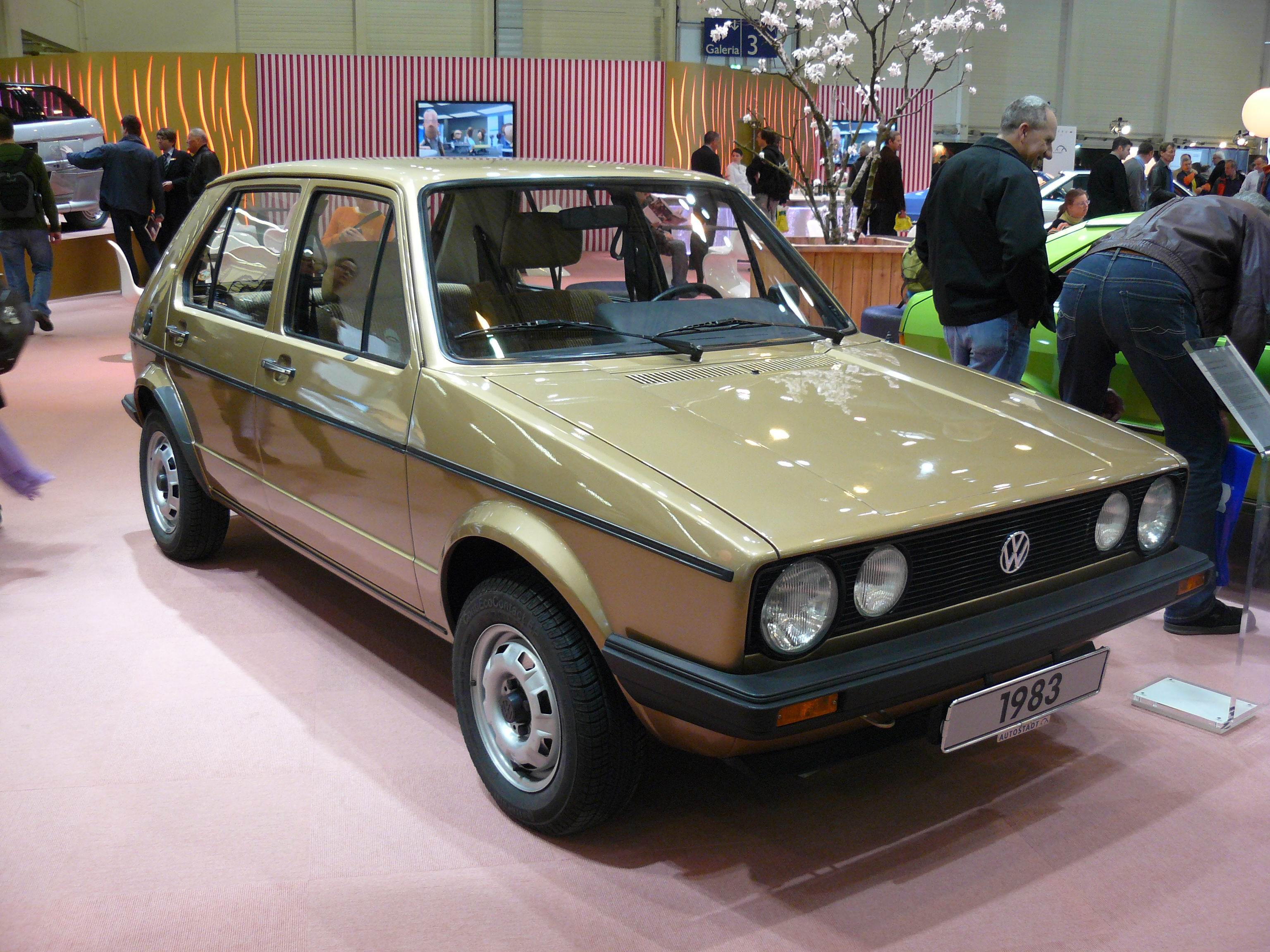 Essen 2011